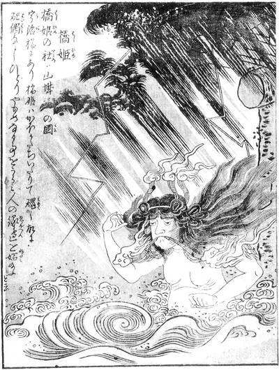 Hashihime (橋姫) from the Konjaku Gazu Zoku Hyakki (今昔画図続百鬼)